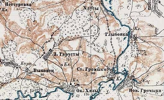 Фрагмент мапи 1916 р. - Могилівська губернія, с. Хізи та с.Гарісти (Гомельський повіт), Старі Громики, Нові Громики, с.Глибовка, с.Биковець